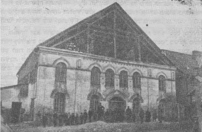 Pod koniec XIX wieku wybudowaną murowaną synagogę.